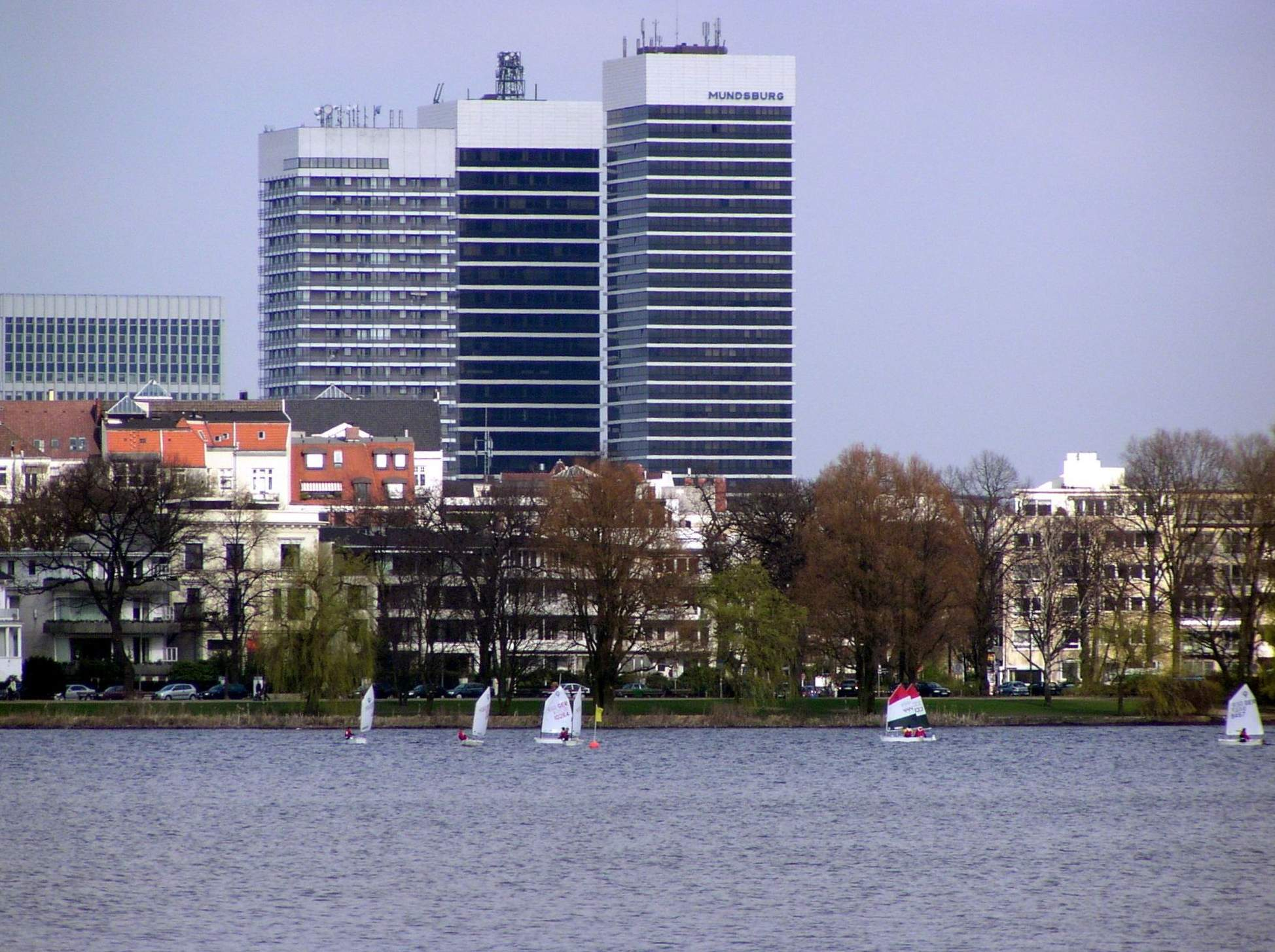 Mundsburg